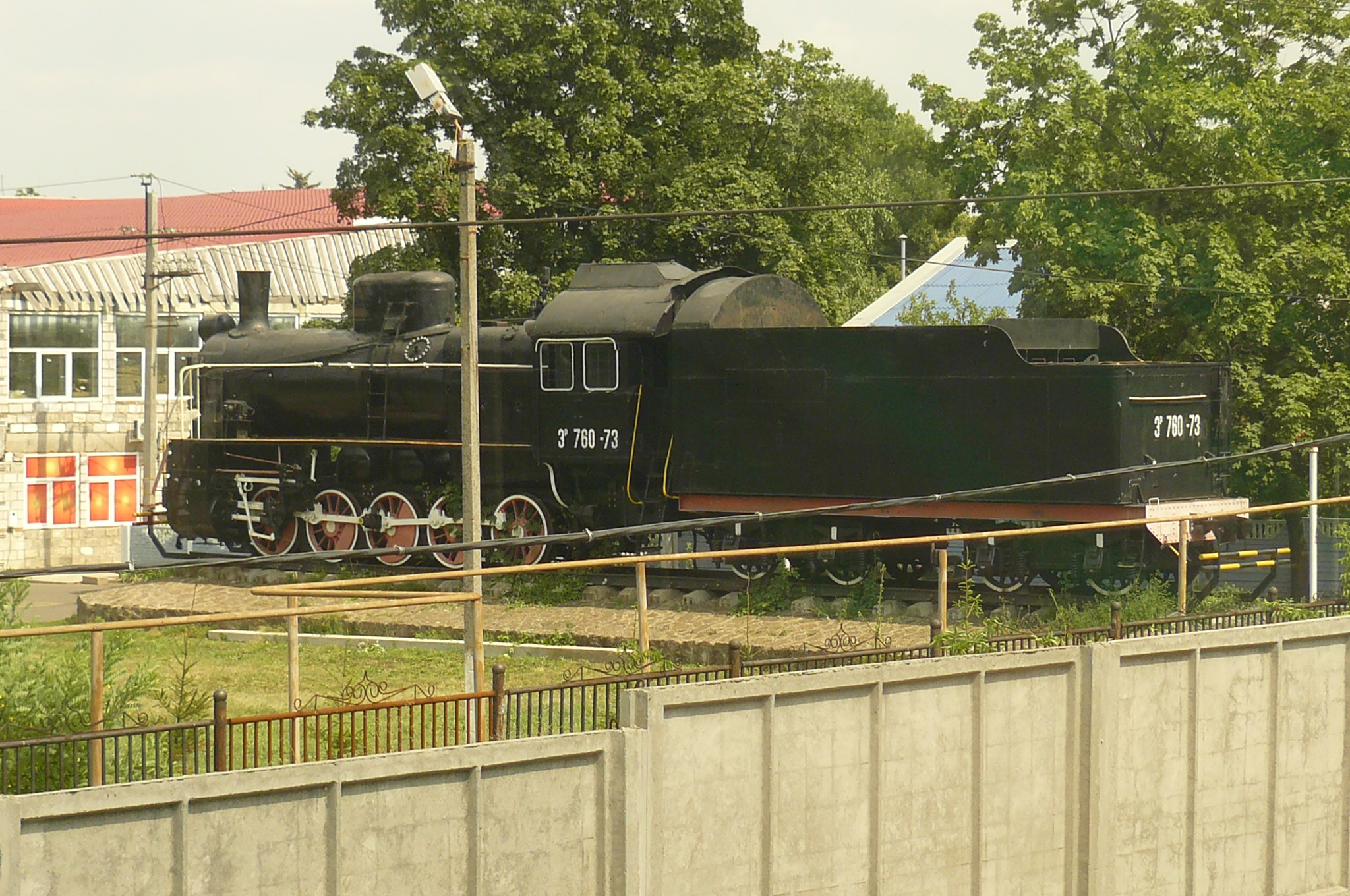 Steam locomotive (monument) in Volnovaha.